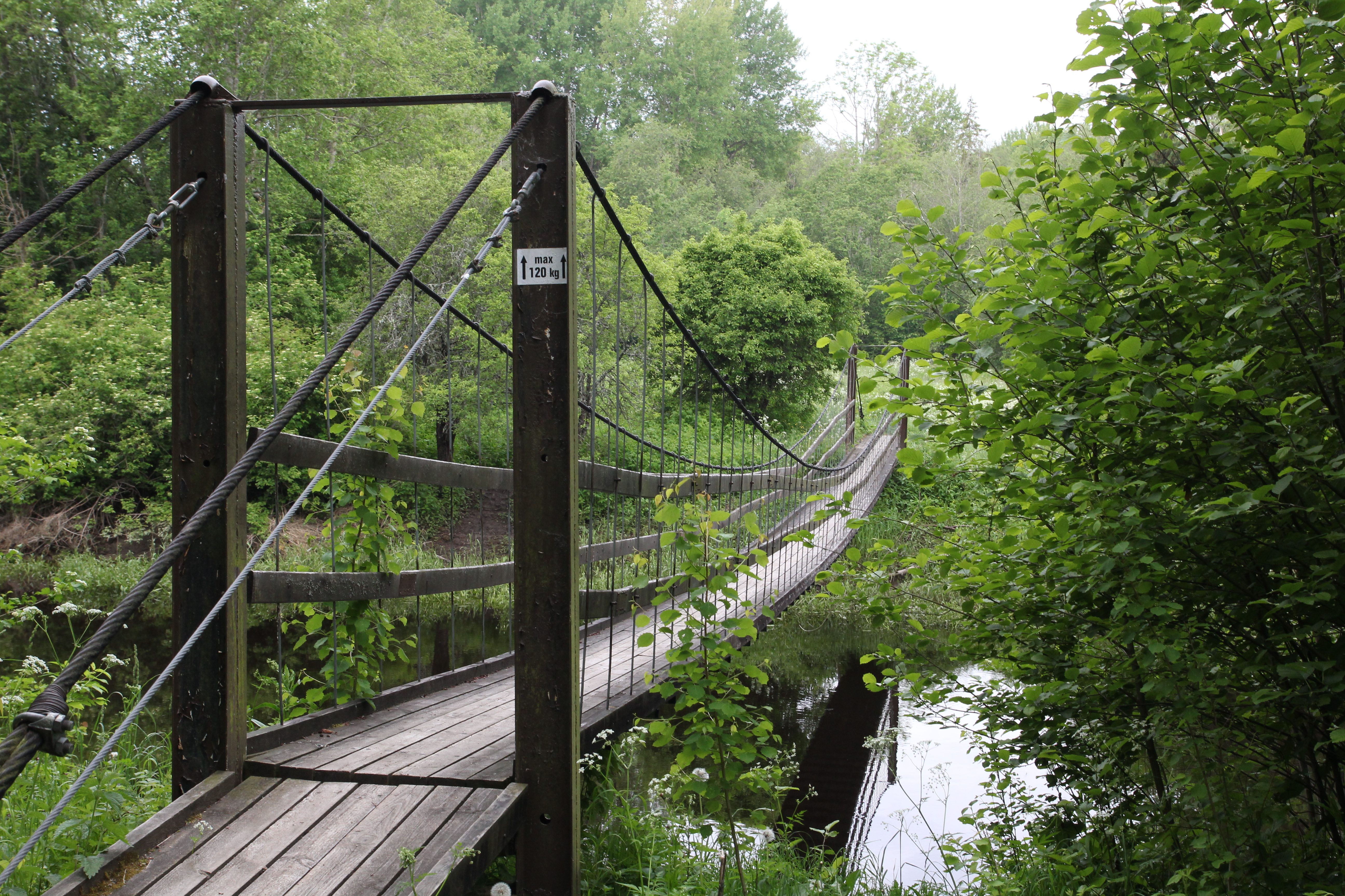 Rippsild Alam-Pedja kaitsealal Kirna matkarajal